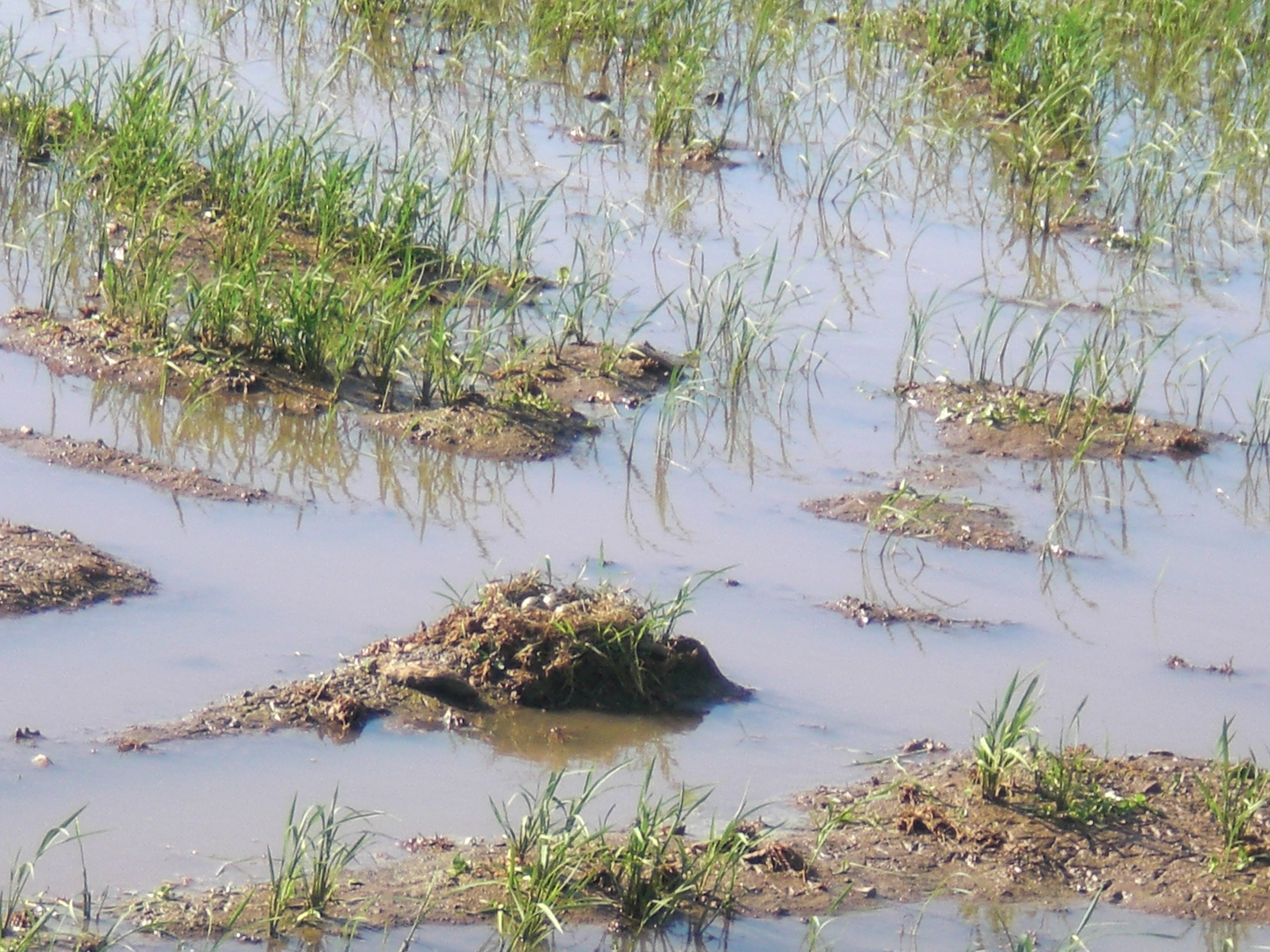 Nesto de himantopoj sur rizkampo ĉe Don Benito, Ekstremaduro, sudokcidenta Hispanio, komence de junio (3-6-14)